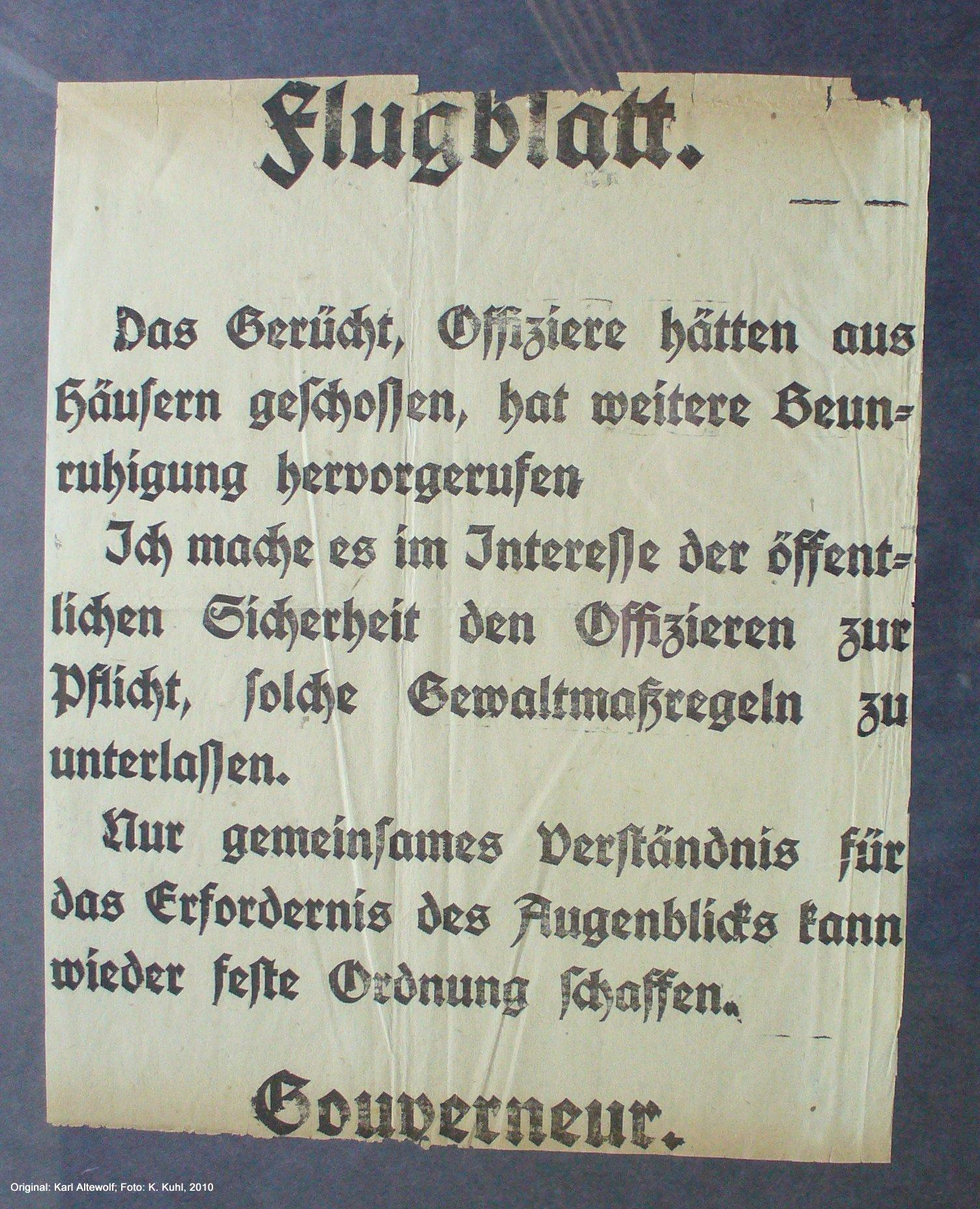 Aufruf des Gouverneurs während des Kieler Matrosenaufstandes, indem die Lage beruhigt werden sollte